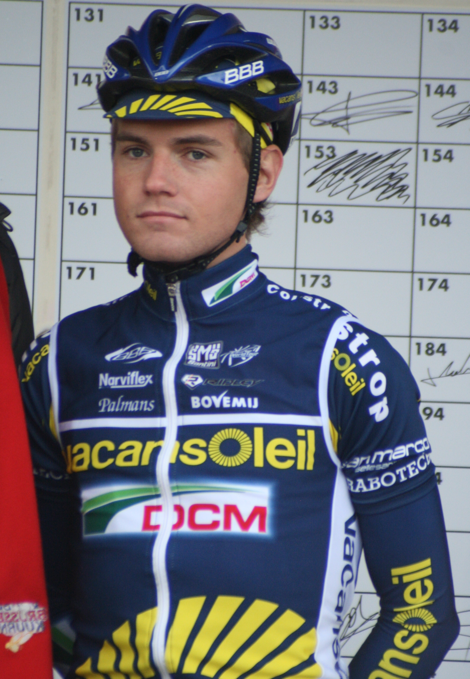 Kuurne-Bruxelles-Kuurne 2011, Rob Ruijgh